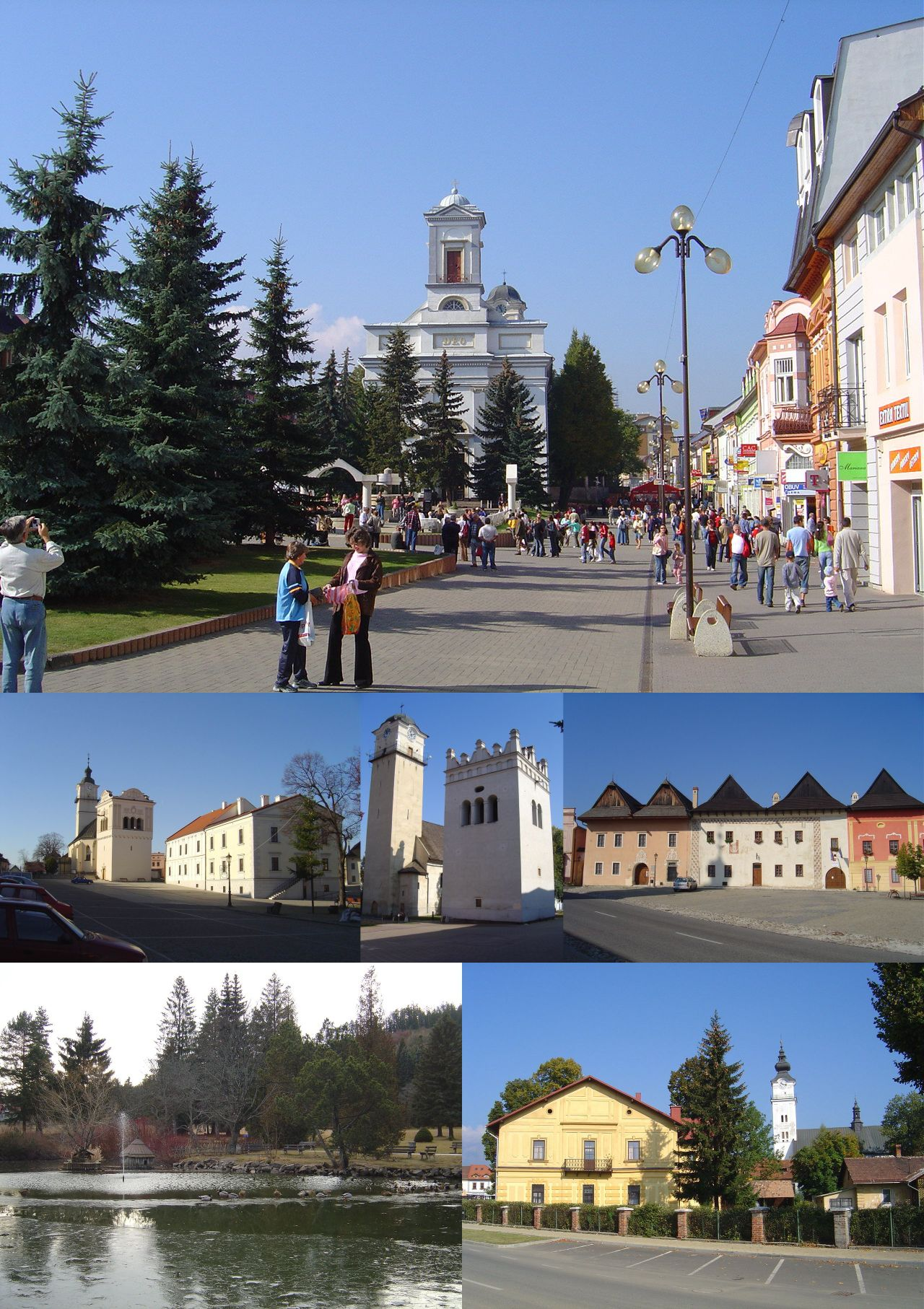 Poprad. Zhora - Námestie sv. Egídia, v strede zľava - Kostol sv. Juraja so zvonicou v Spišskej Sobote, Kostol sv. Egídia so zvonicou na Námestí sv. Egídia v Starom meste, meštianske domy na spišskosobotskom námestí, dolu zľava - Kvetnica, prímestská rekreačná oblasť, námestie s Kostolom sv. Jána Krstiteľa v mestskej časti Veľká